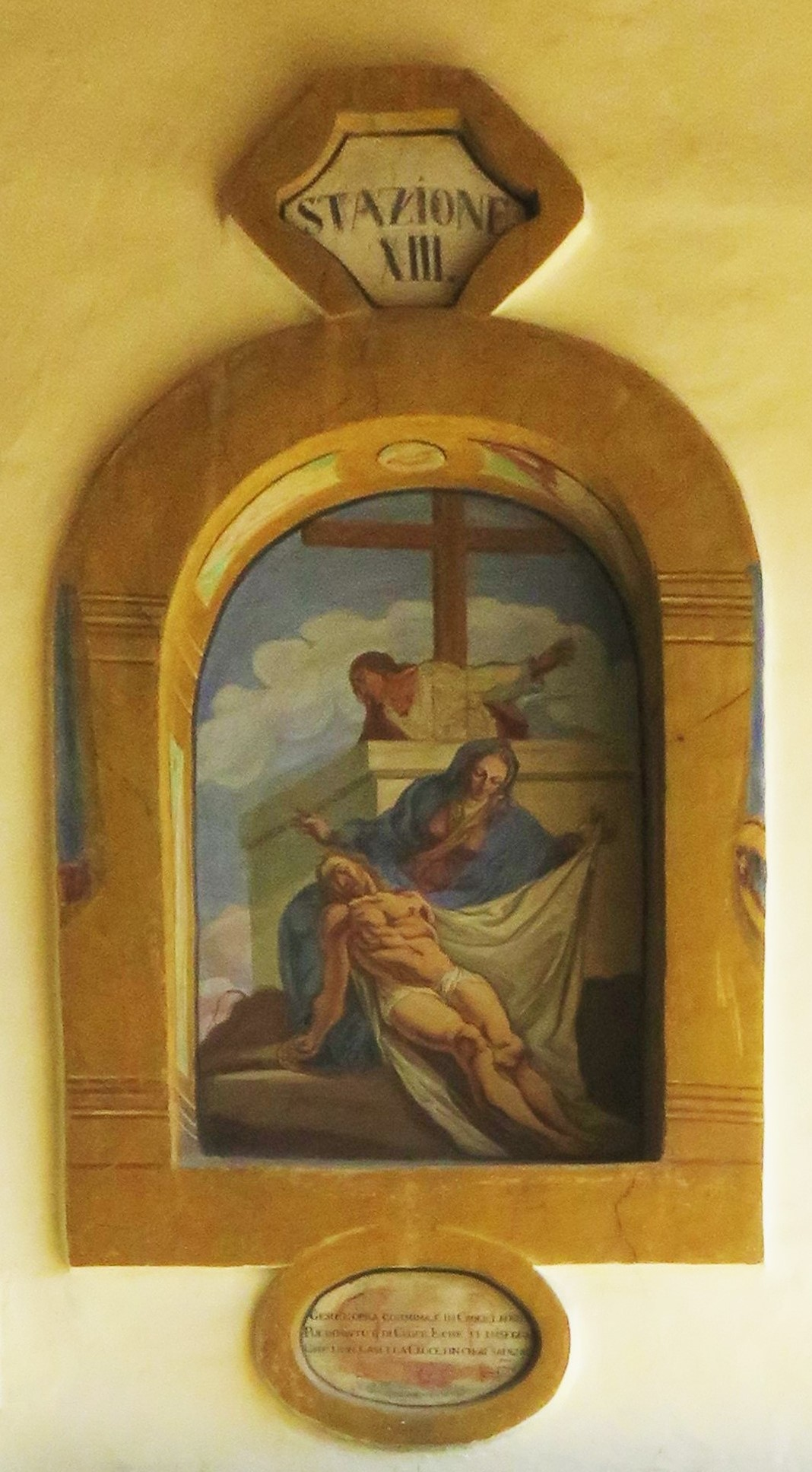 Via Crucis del 1742 sulle pareti esterne della chiesa dei Santi Filippo e Giacomo attribuita a Giovanni Battista Cudauner (1700-1771), altoatesino stabilitosi a Campitello di Fassa. Stazione XIII